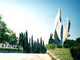 Vyezdnaya